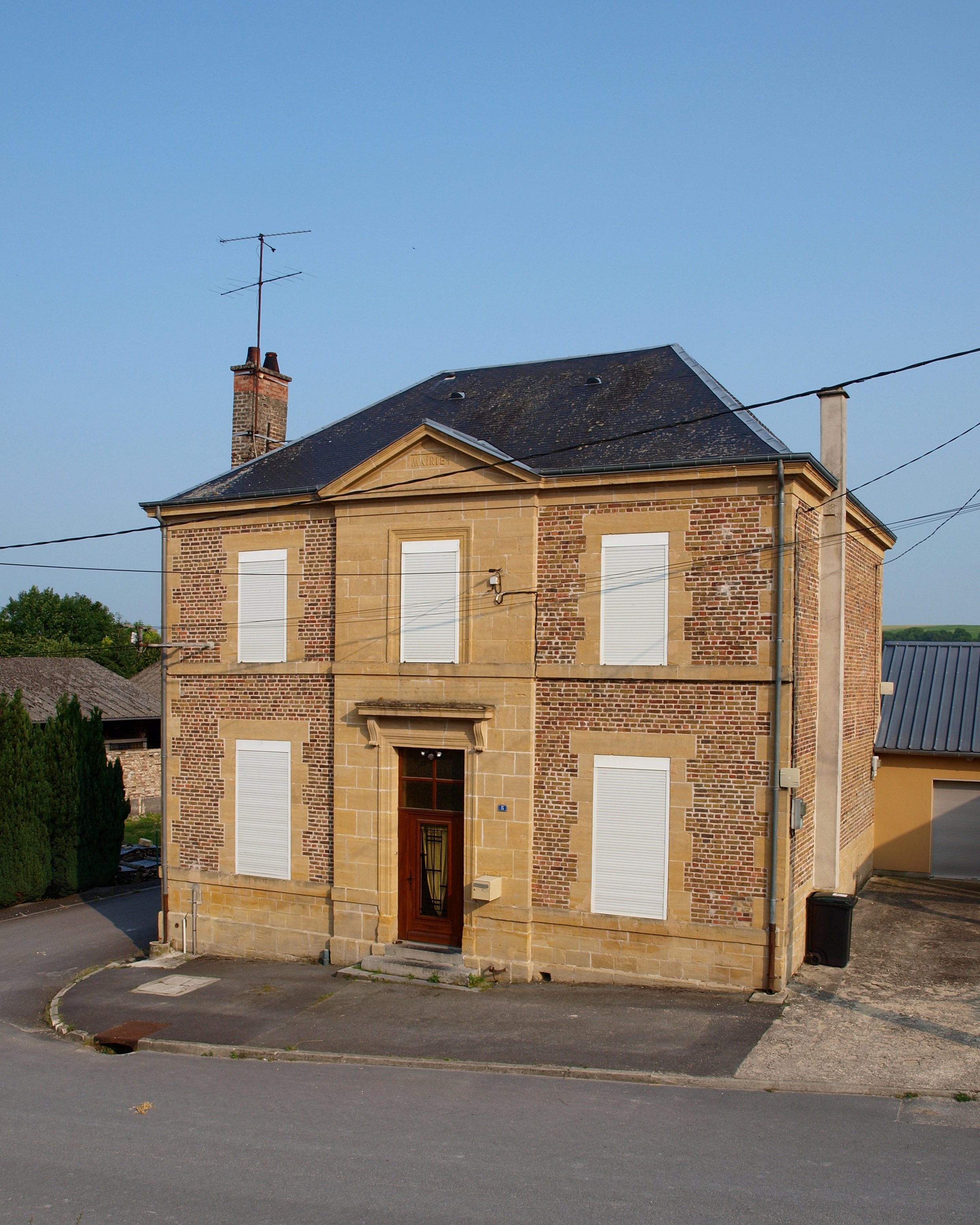 Contreuve (Ardennes, France) ; mairie